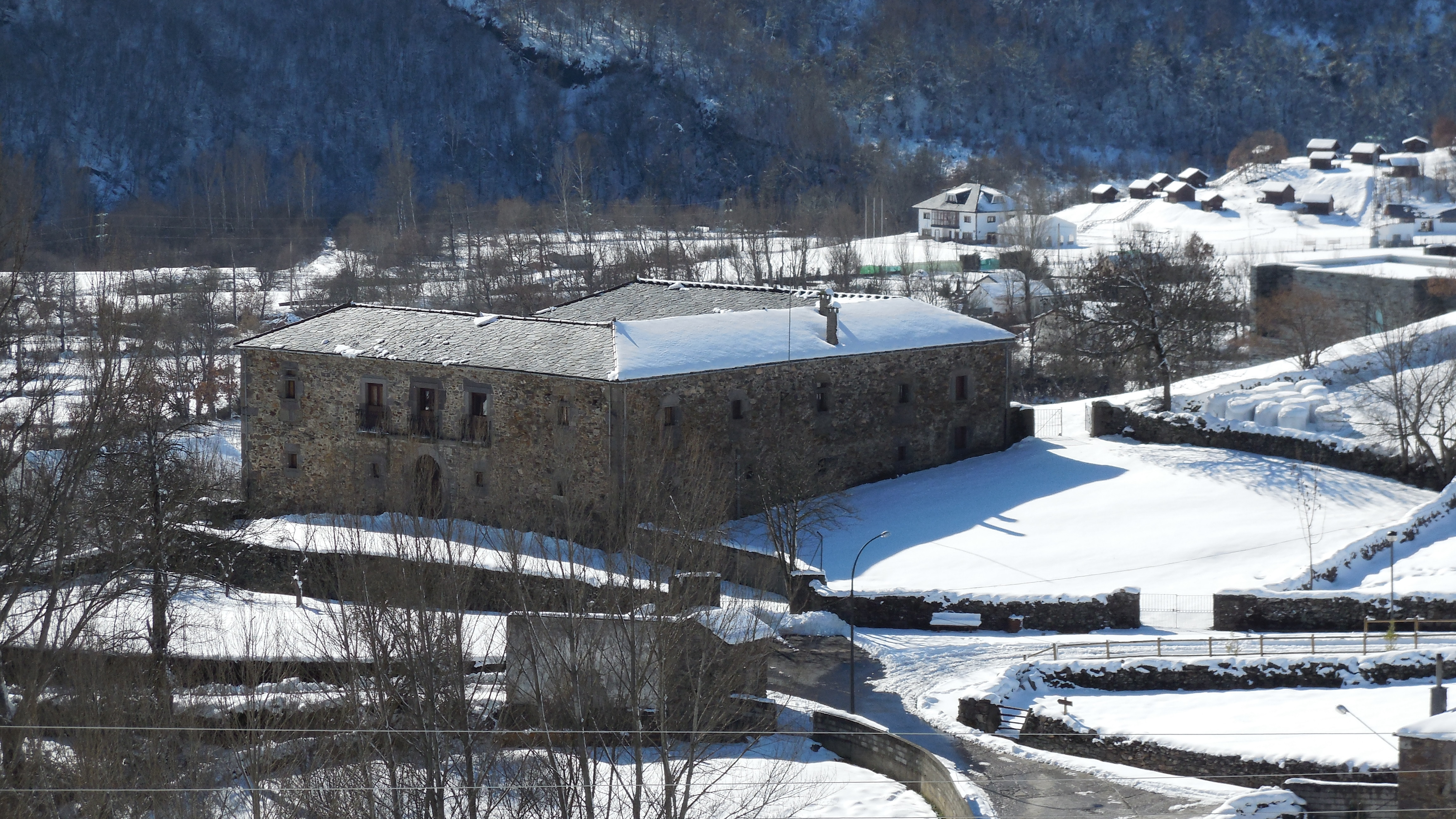 San Miguel de Laciana, Villablino (León, España).